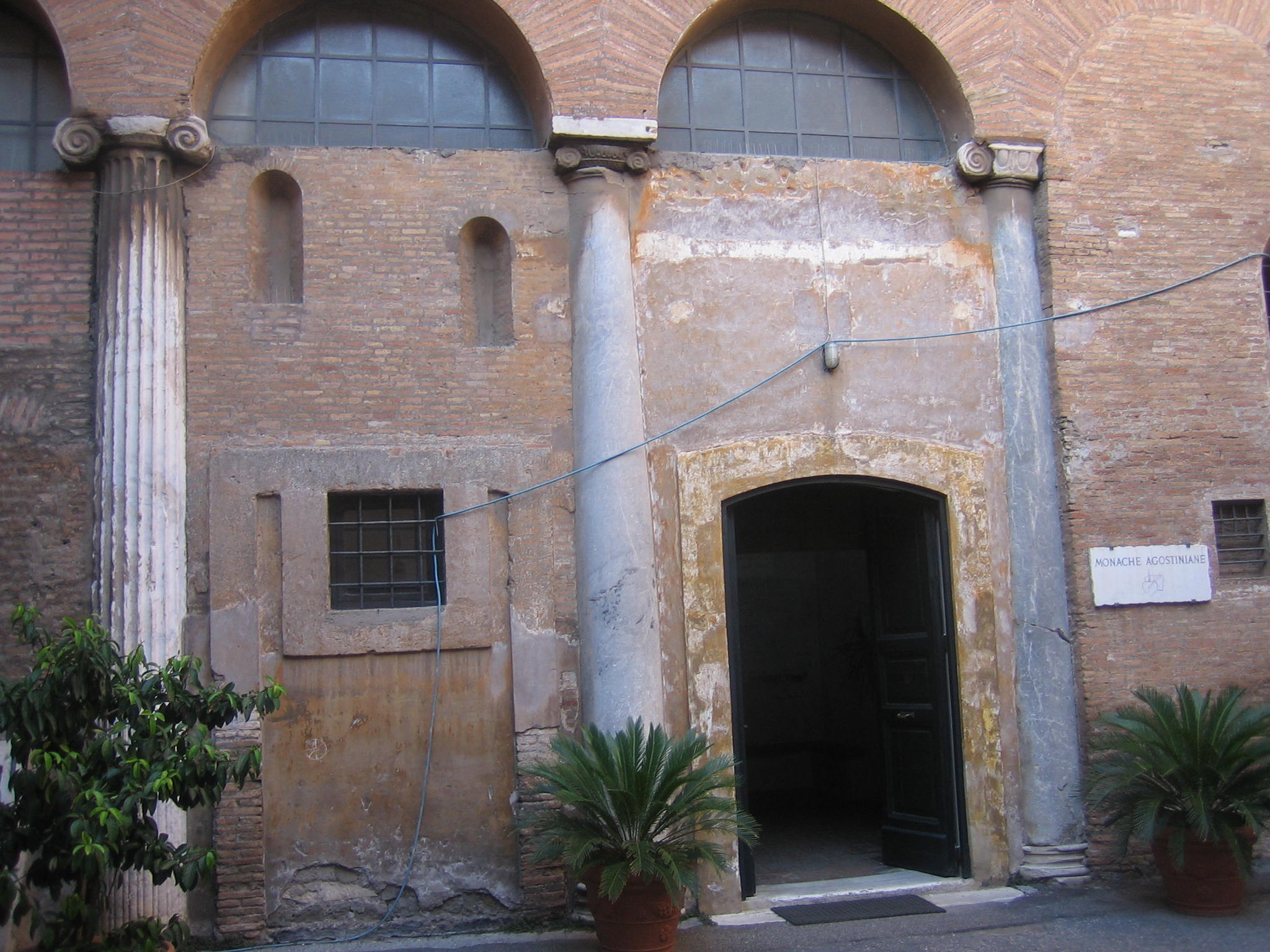 Säulen aus dem Vorgängerbau von S.Quattro Coronati in Rom